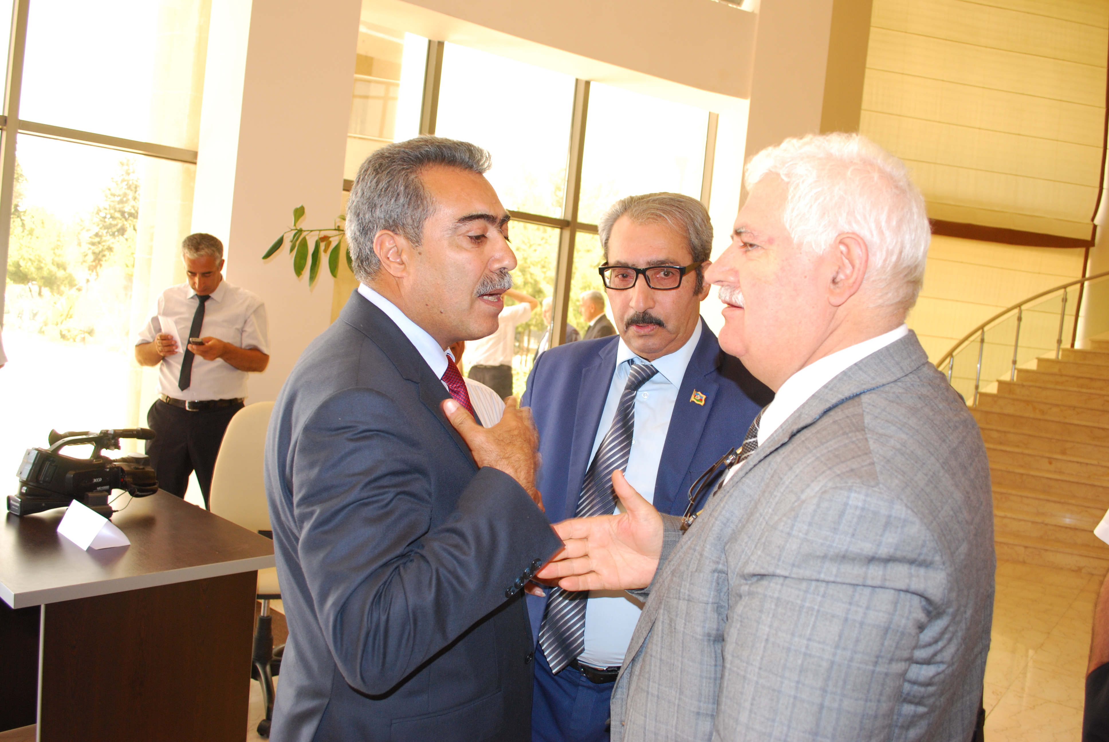 Vüqar Səfərli, Tofiq Yusif və Umud Rəhimoğlu